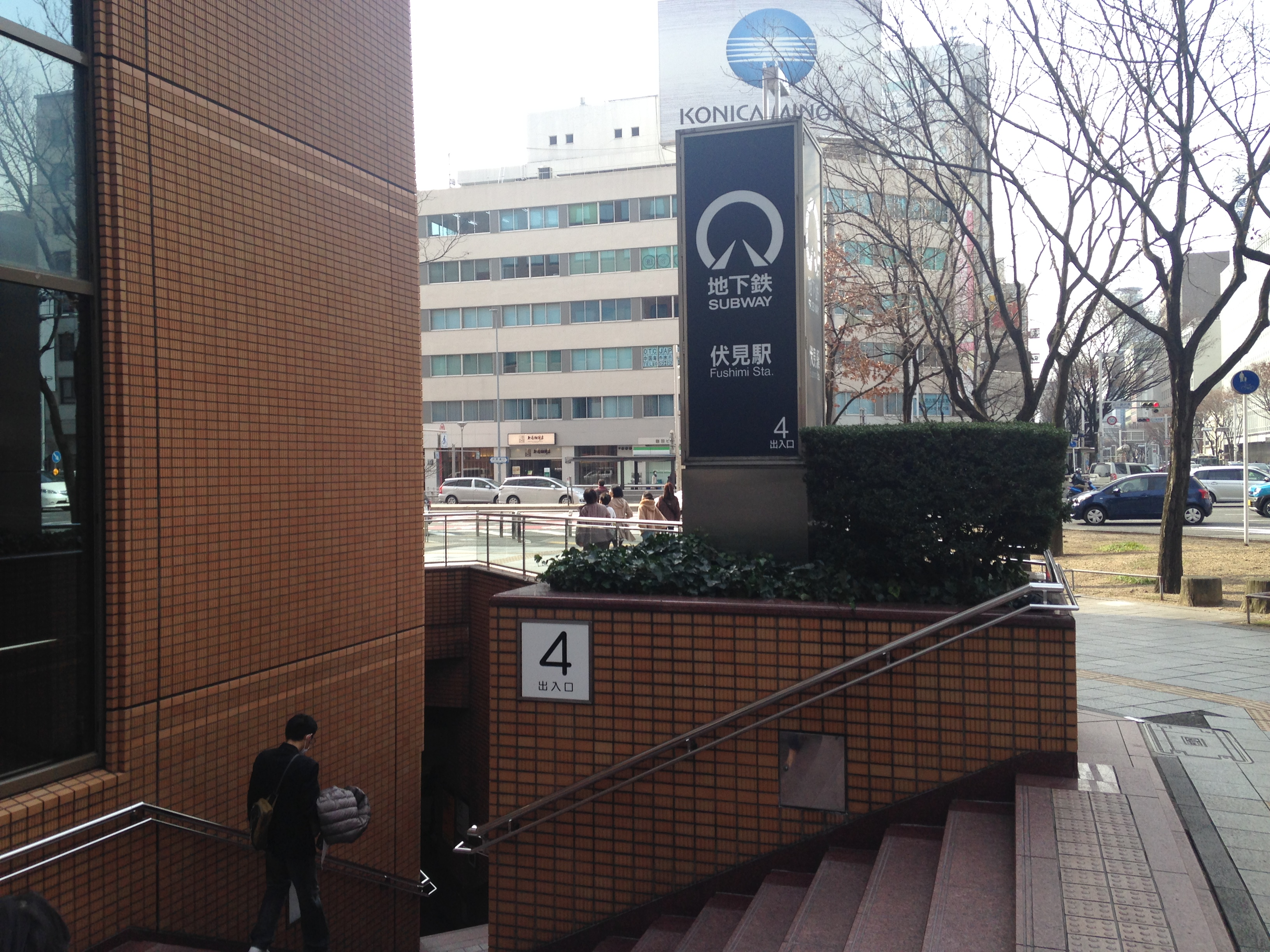 伏見駅(名古屋市営地下鉄)の4番出入り口